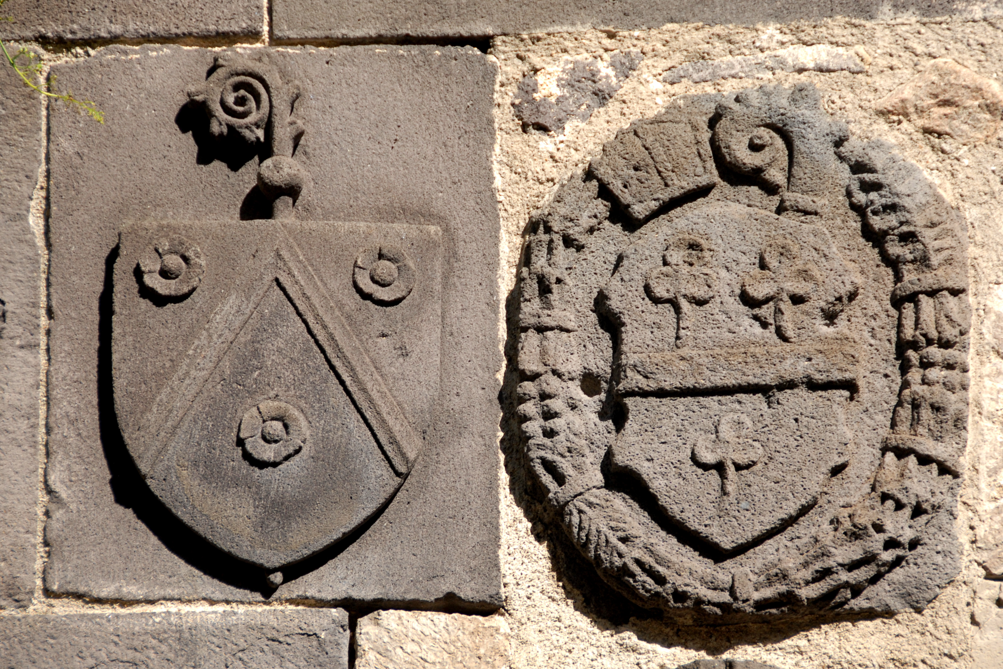 Mozat, Wappen über Nische in Joch 1